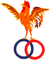 Logo du Comité français interfédéral, disparu en 1919 avec la création de la Fédération française de football